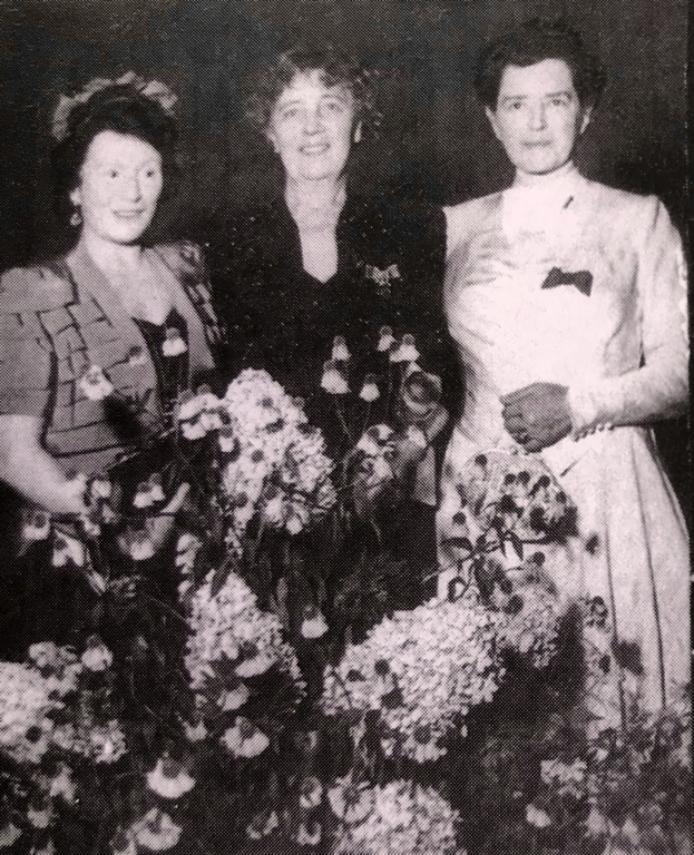 Nathalia Ahlströms 70-årsfest på Konserthuset i Göteborg 25 september 1947